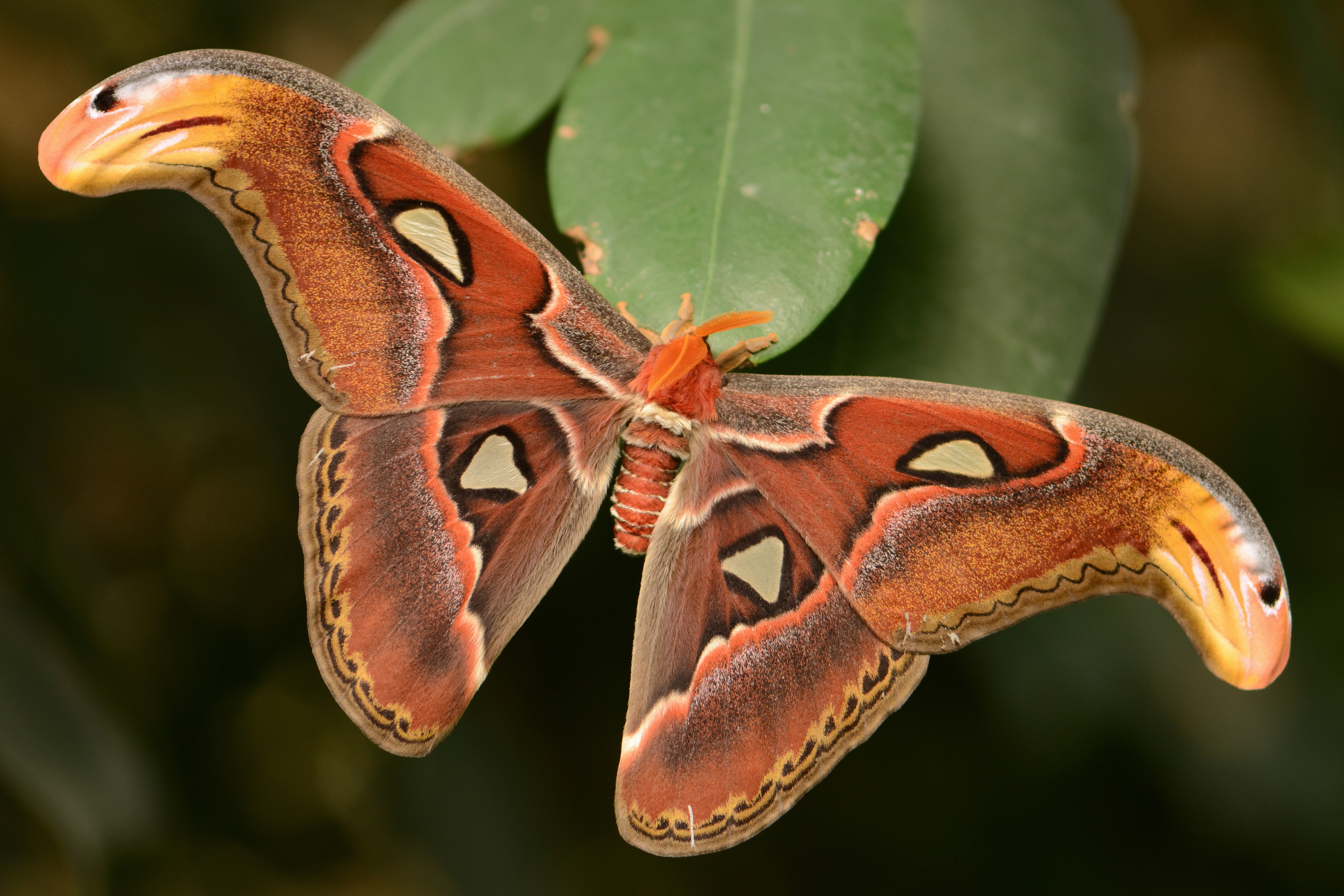 Noorderdierenpark, Emmen